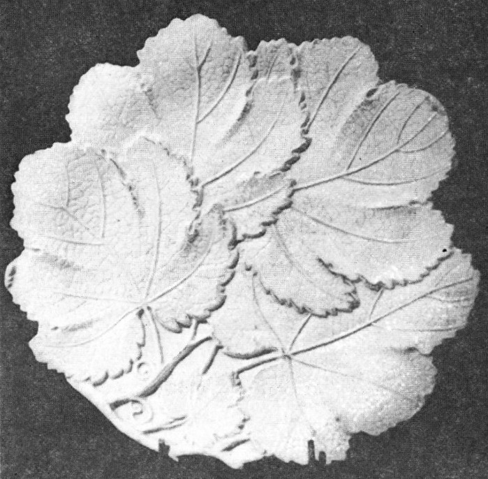 Kőedény tál, Miskolc, 1846